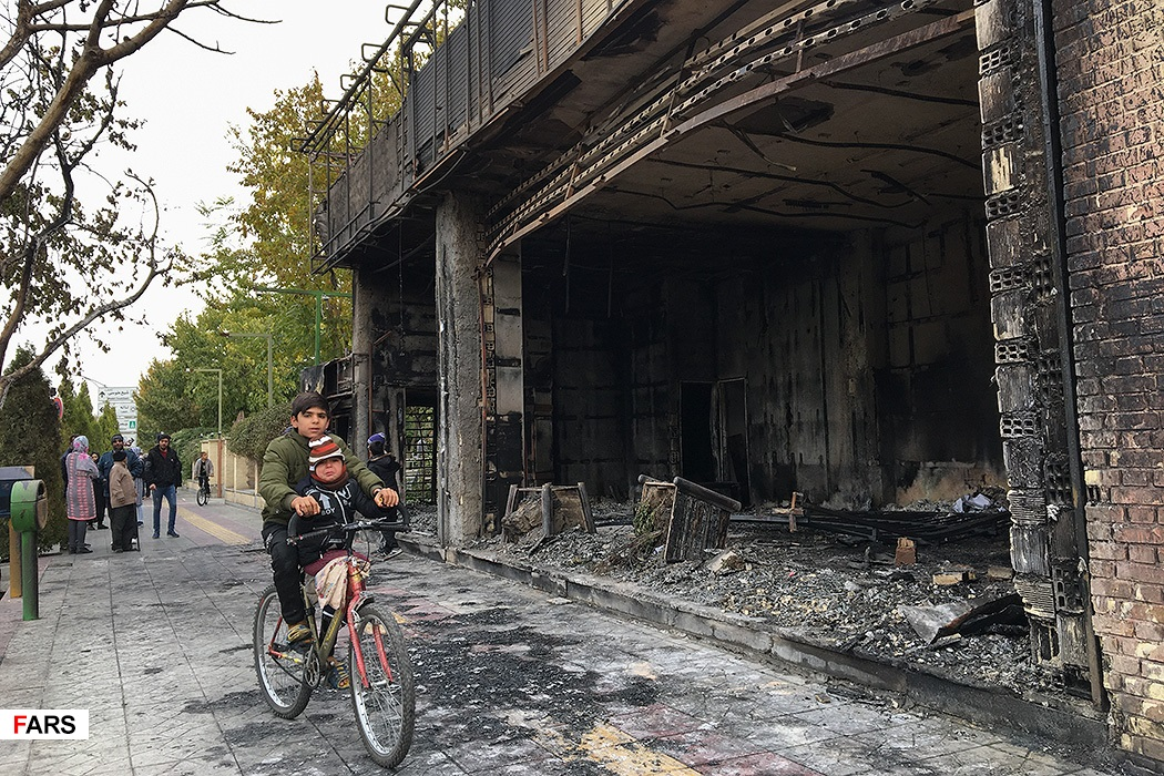 در جریان اعترضات مردمی به سهمیه‌بندی بنزین در ایران، تعدادی از بانک‌ها، پمپ بنزین‌ها و فروشگاه‌ها به آتش کشیده‌شدند.